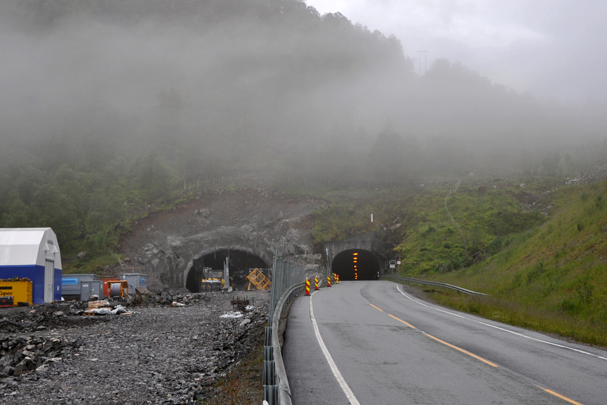 Innslaget fra Herdalen til den gamle Ljønibb- og Hamregjølet tunnel til høyre og den nye Ljøtunnelen under bygging til venstre.